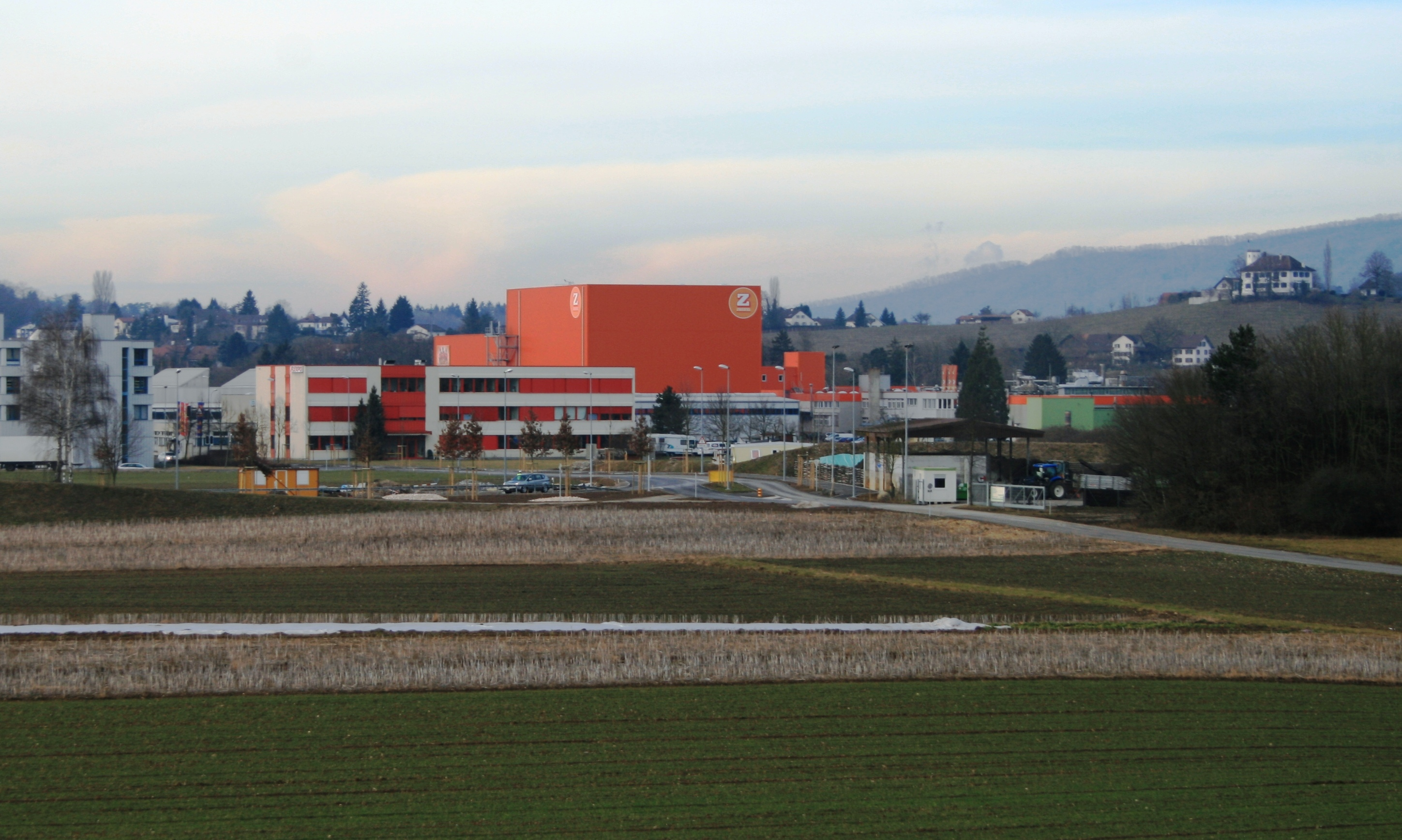 Fabrik der Fa. Zweifel in Spreitenbach, Schweiz